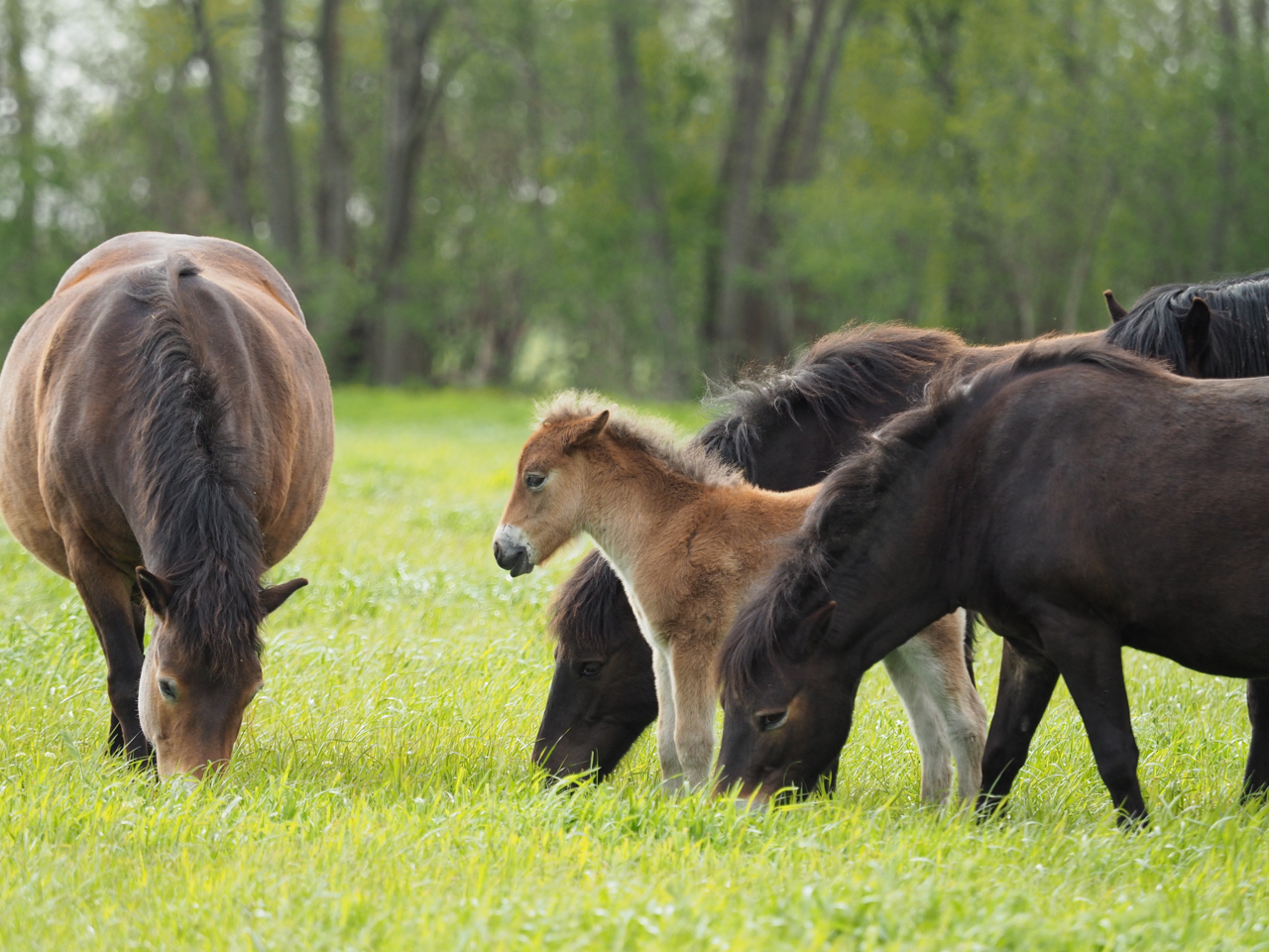 Exmoor-Ponys bei der Ganzjahres-Beweidung im NSG Moorlandschaft Alperstedter Ried